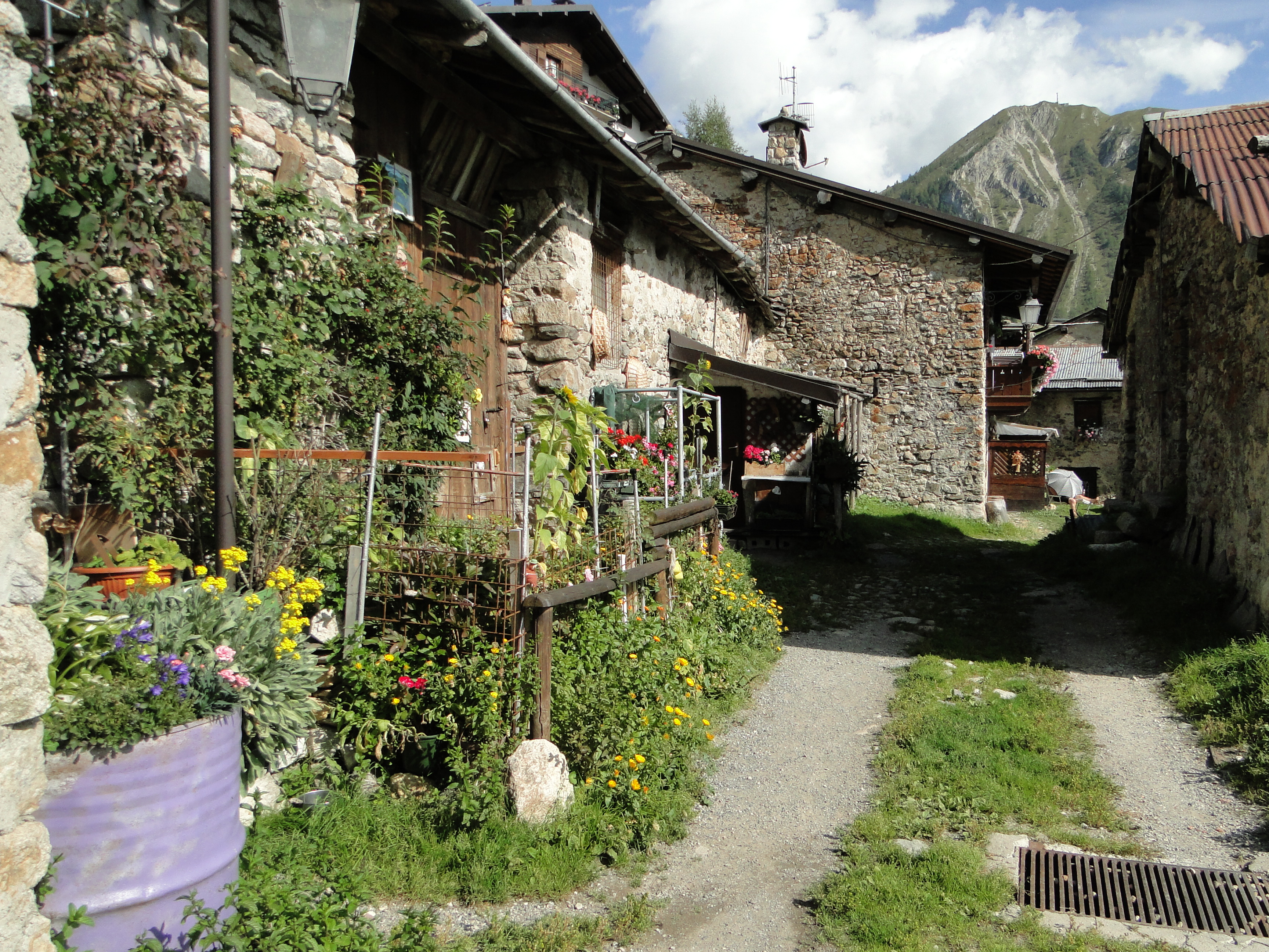 Piano, frazione di Foppolo (BG)